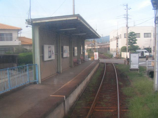 紀州鉄道 学門駅